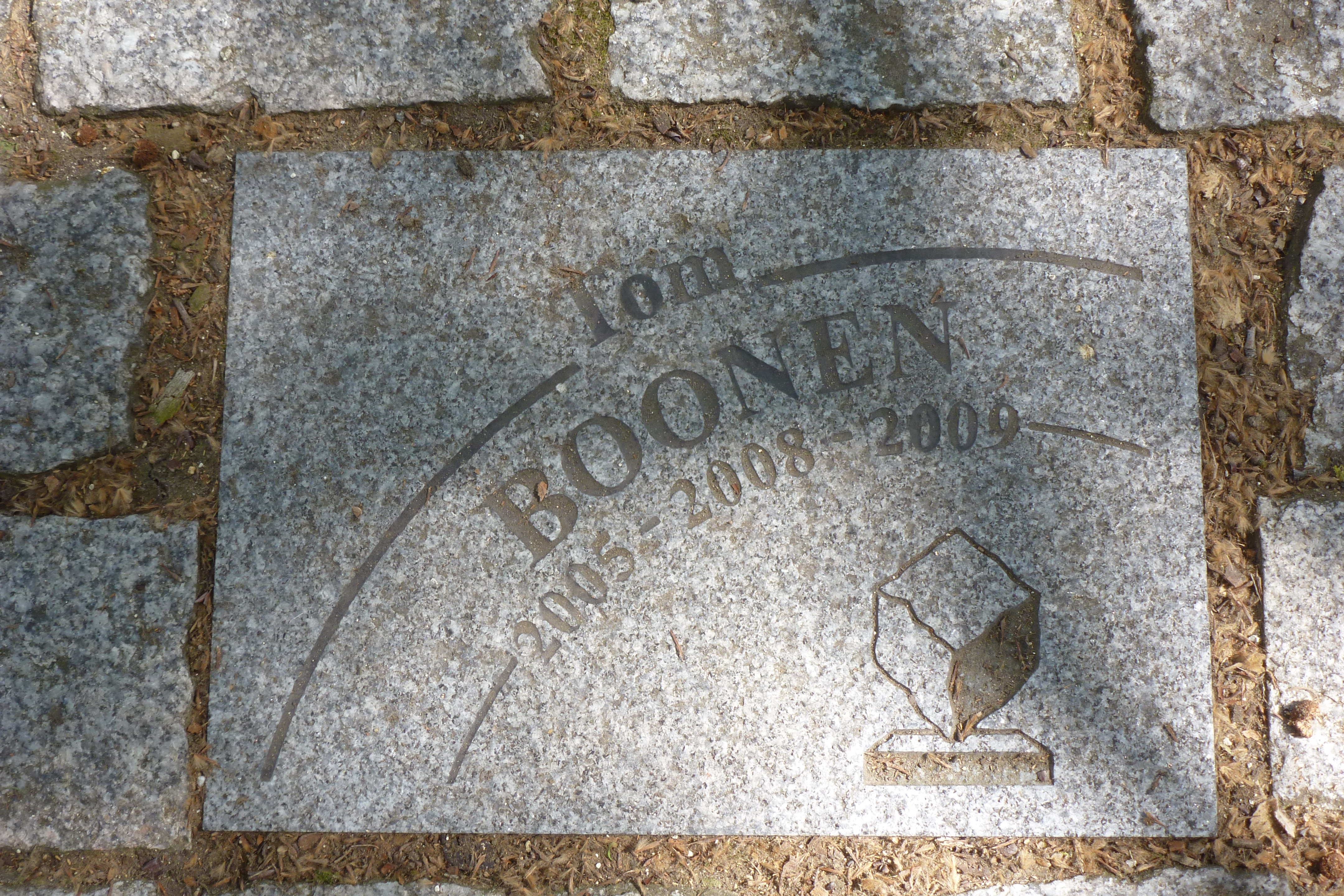 Pflasterstein für Tom Boonen auf der Allee Charles Crupelandt in Roubaix